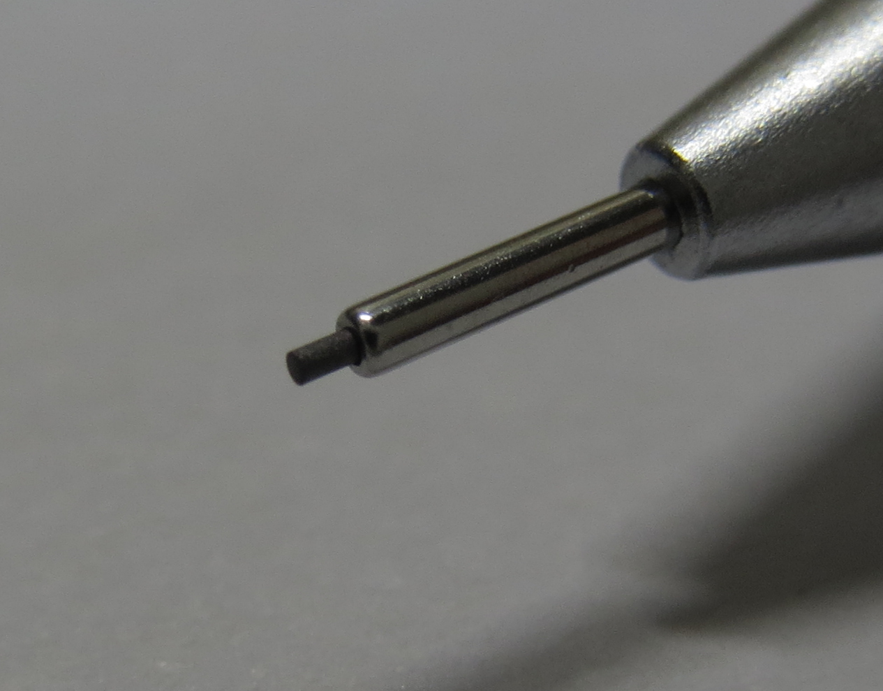 芯口径 0.3mm